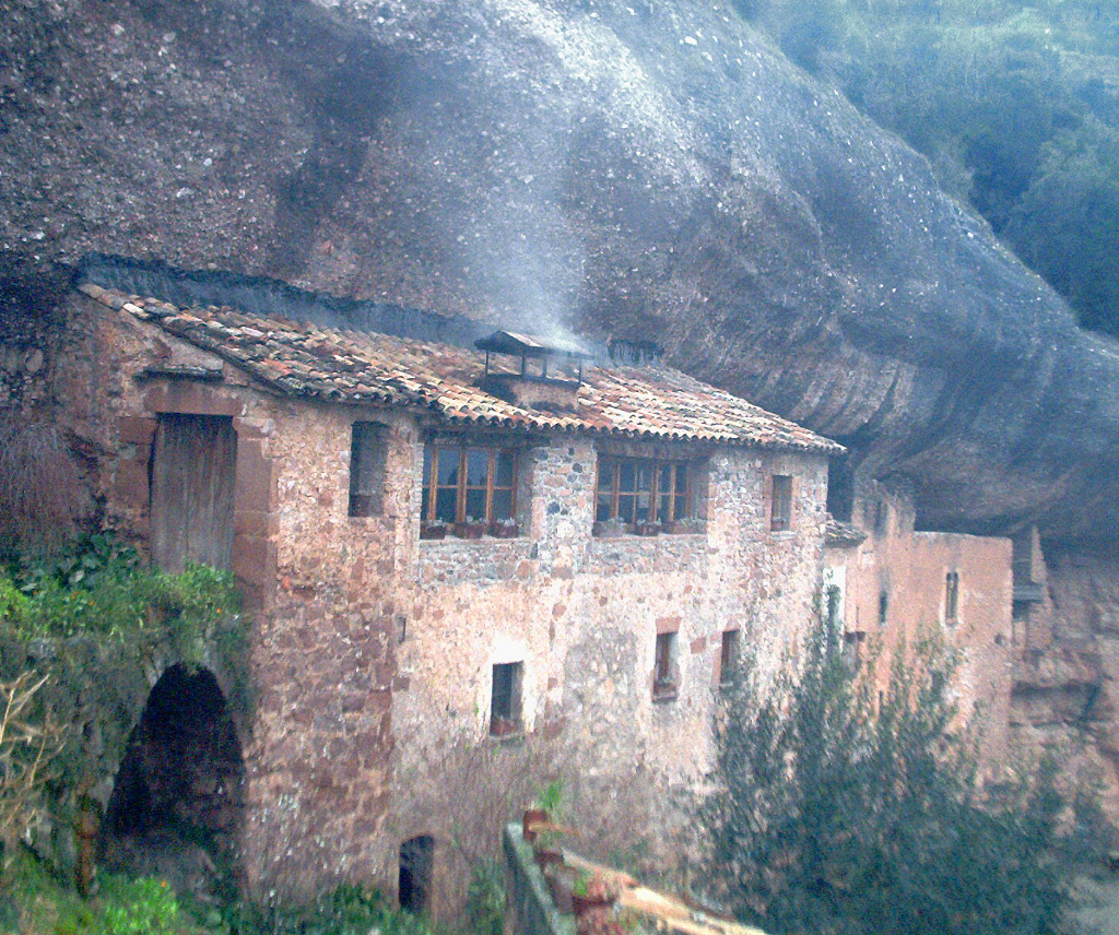 Prop de Mura, i comunicada amb el poble per una pista sense asfaltar en bon estat i amb indicadors, Hi trobem can Puig de la Balma. una masia ocupada al menys des del segle X. La major part de la casa té com a sostre una balma natural de grans dimensions i està condicionada com a museu, amb temàtica local i sobre la vida rural. Unes habitacions han estat condicionades per a el turisme rural. En un edifici proper hi ha un petit restaurant i també una capella relativament moderna.